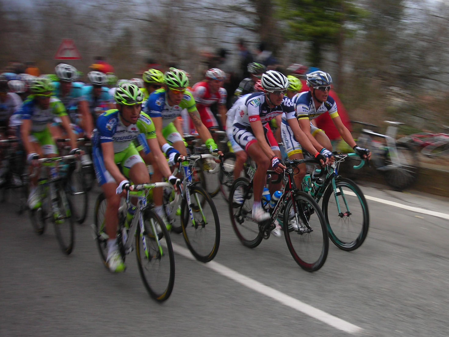 Il gruppo sulle Manie alla Milano-Sanremo 2012